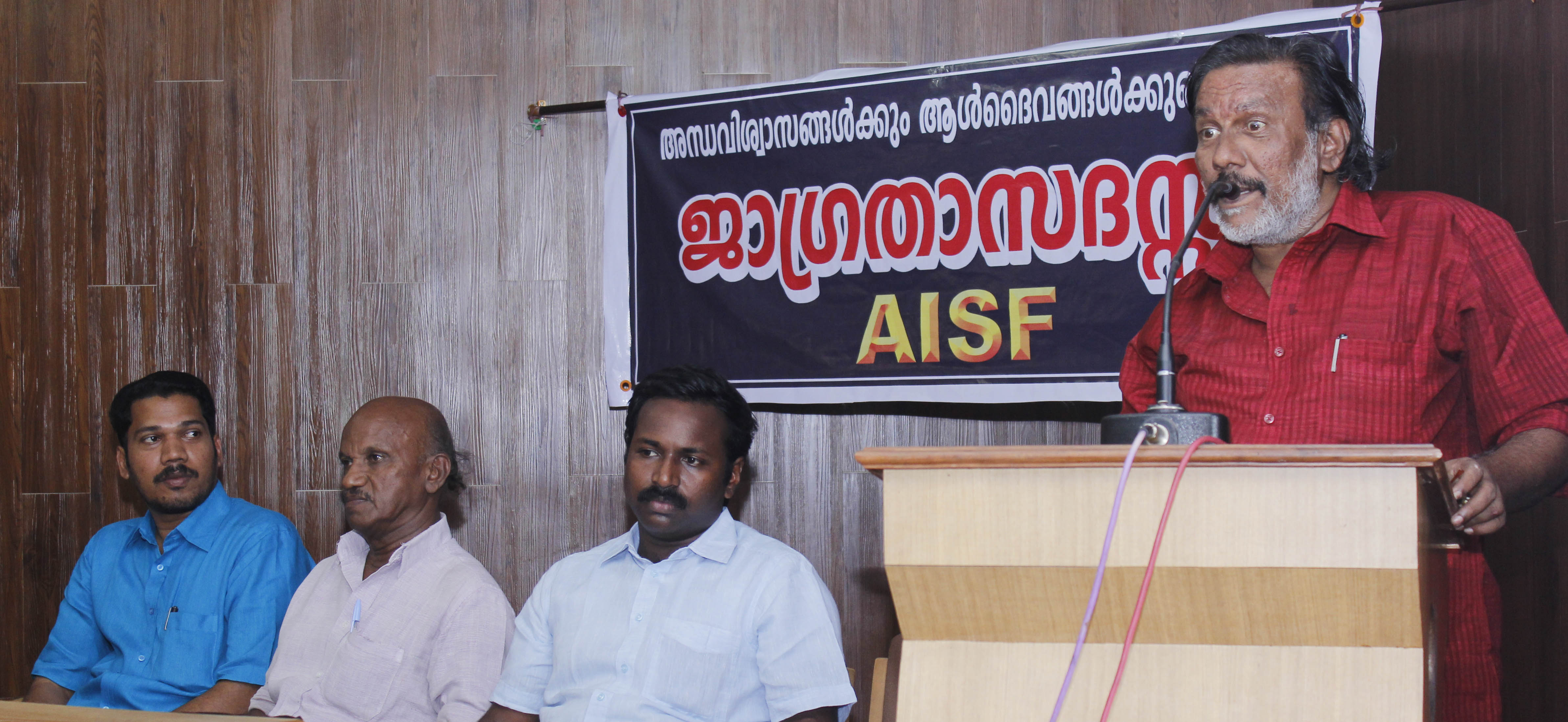 അന്ധവിശ്വാസങ്ങൾക്കും ആൾദൈവങ്ങൾക്കുമെതിരെ എ ഐ എസ് എഫ് കൊല്ലത്ത് സംഘടിപ്പിച്ച ജാഗ്രതാ സദസ്സ് കവി കുരീപ്പുഴ ശ്രീകുമാർ ഉദ്‌ഘാടനം ചെയ്യുന്നു.